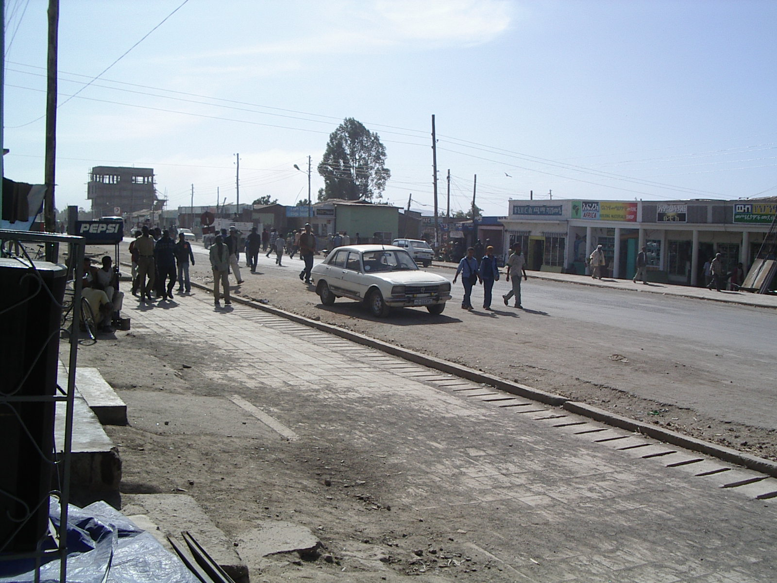 Grande rue de Shashämäné, ville située dans la Vallée du Rift en Éthiopie, à 250 km au sud d'Addis-Abeba. Prise en février 2005 par moi-même.